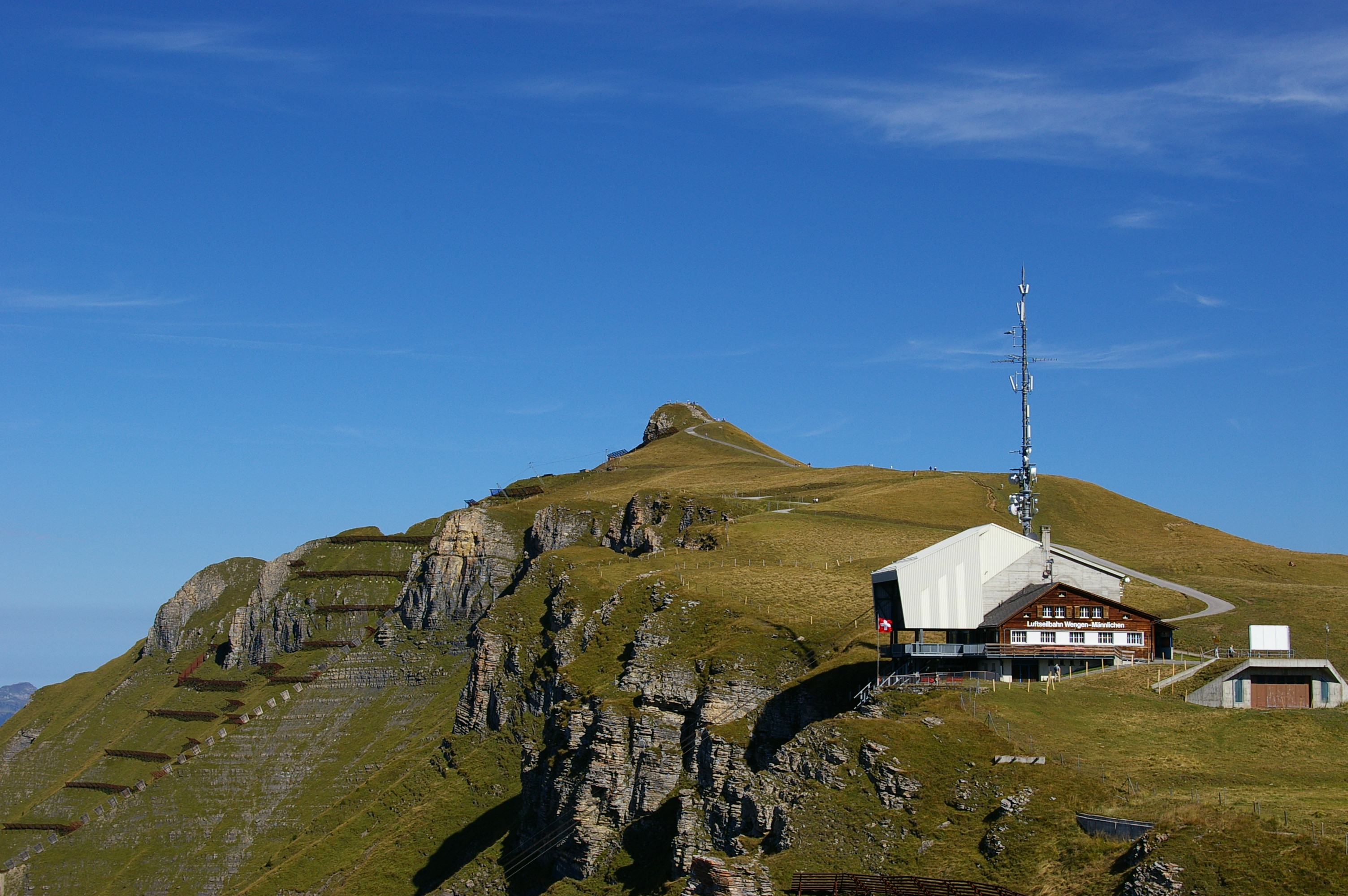 Blick hinauf zum Gipfel des Männlichen mit UNESCO-Weg von der Bergstation der Gondelbahn Grindelwald-Männlichen aus. Im Vordergrund die Bergstation der Luftseilbahn Wengen-Männlichen.